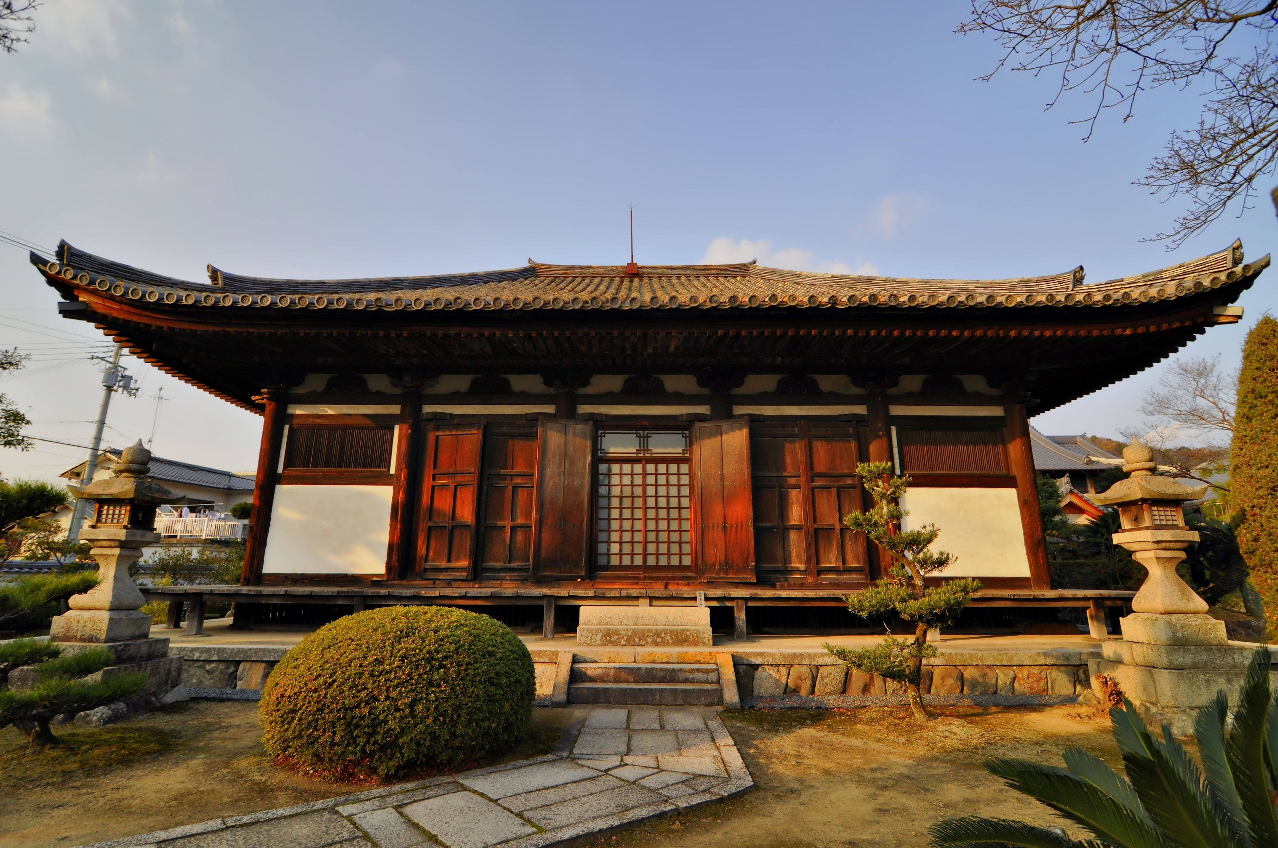 慈眼山孝恩寺観音堂